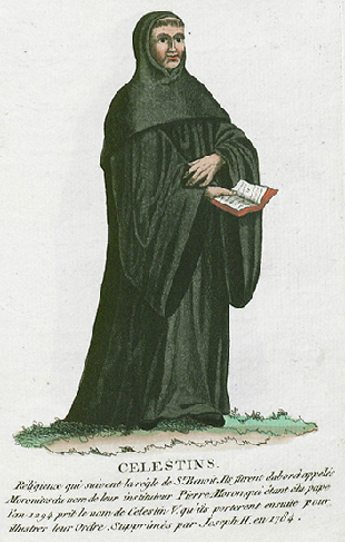 Collection de costumes de tous les ordres monastiques, supprimés à differentes époques, dans la ci-devant Belgique, Bruxelles, Philippe Joseph Maillart et sœur, 1811